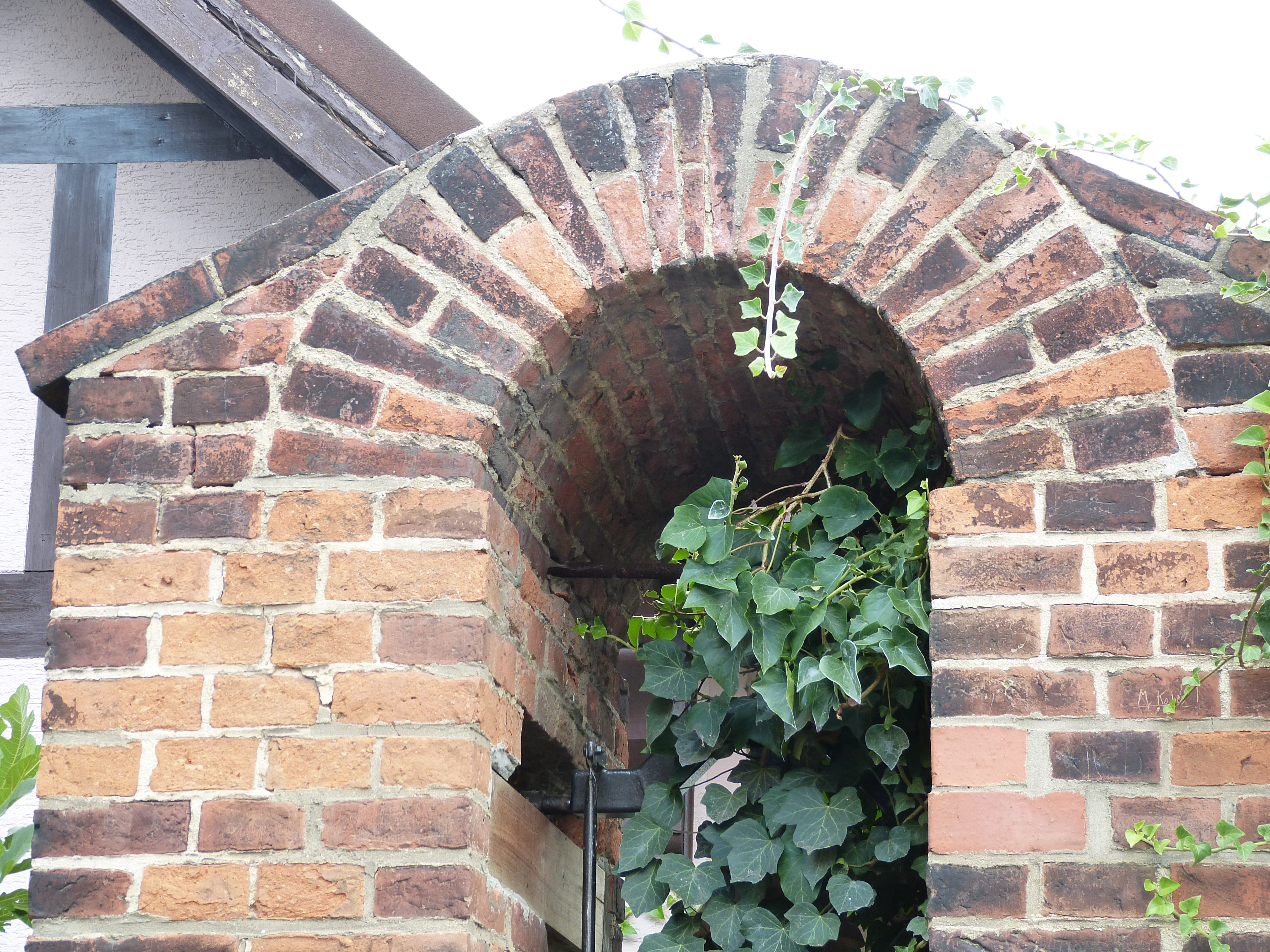 "Glockenturm" der ehemaligen Schule von Schmerz